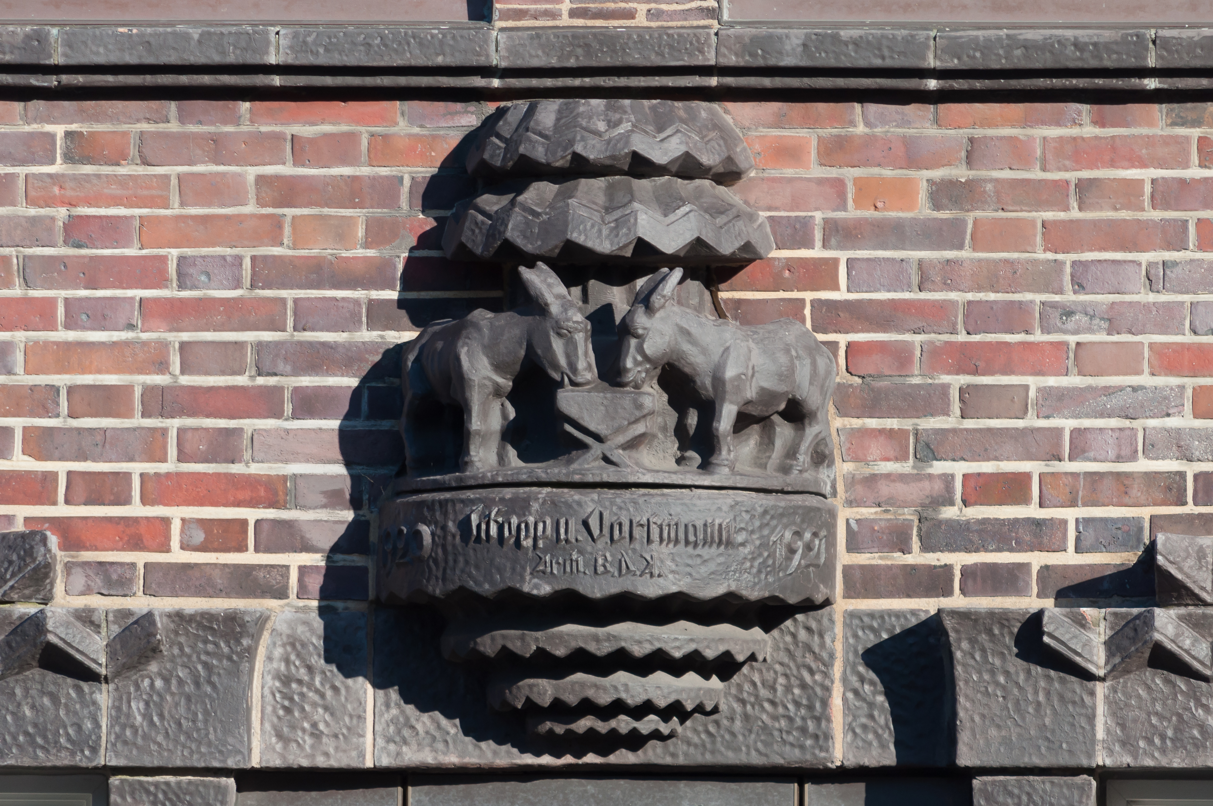 Fassadenschmuck am Brahmskontors in Hamburg-Neustadt. This is a photograph of an architectural monument.